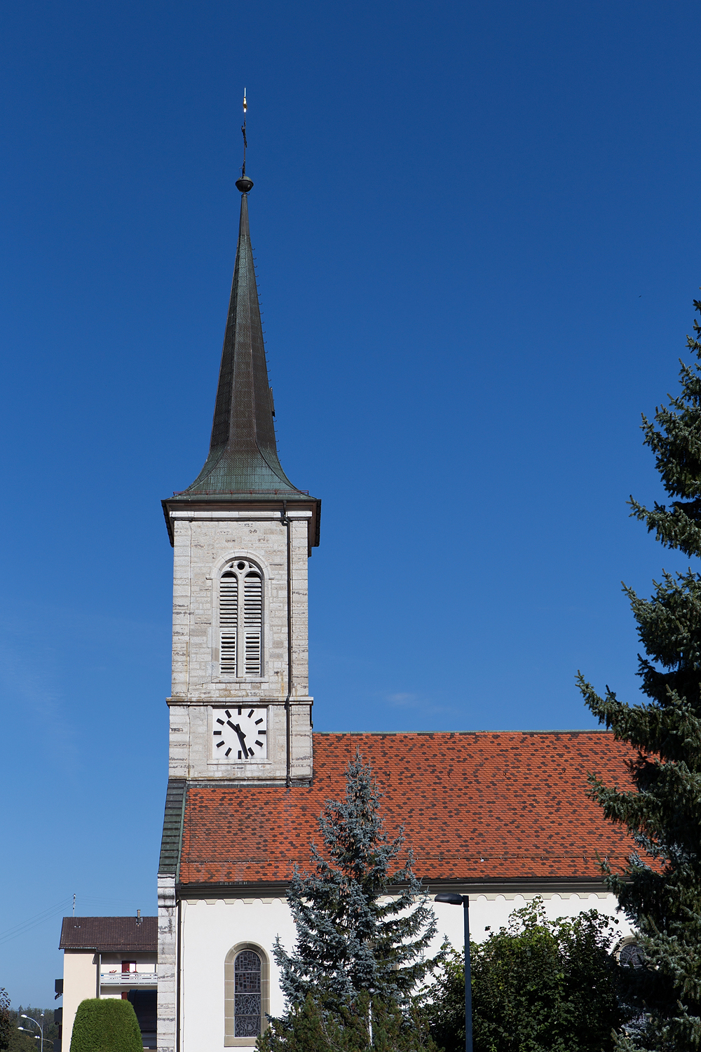 Dorfkirche Sankt-Othmar in Broc